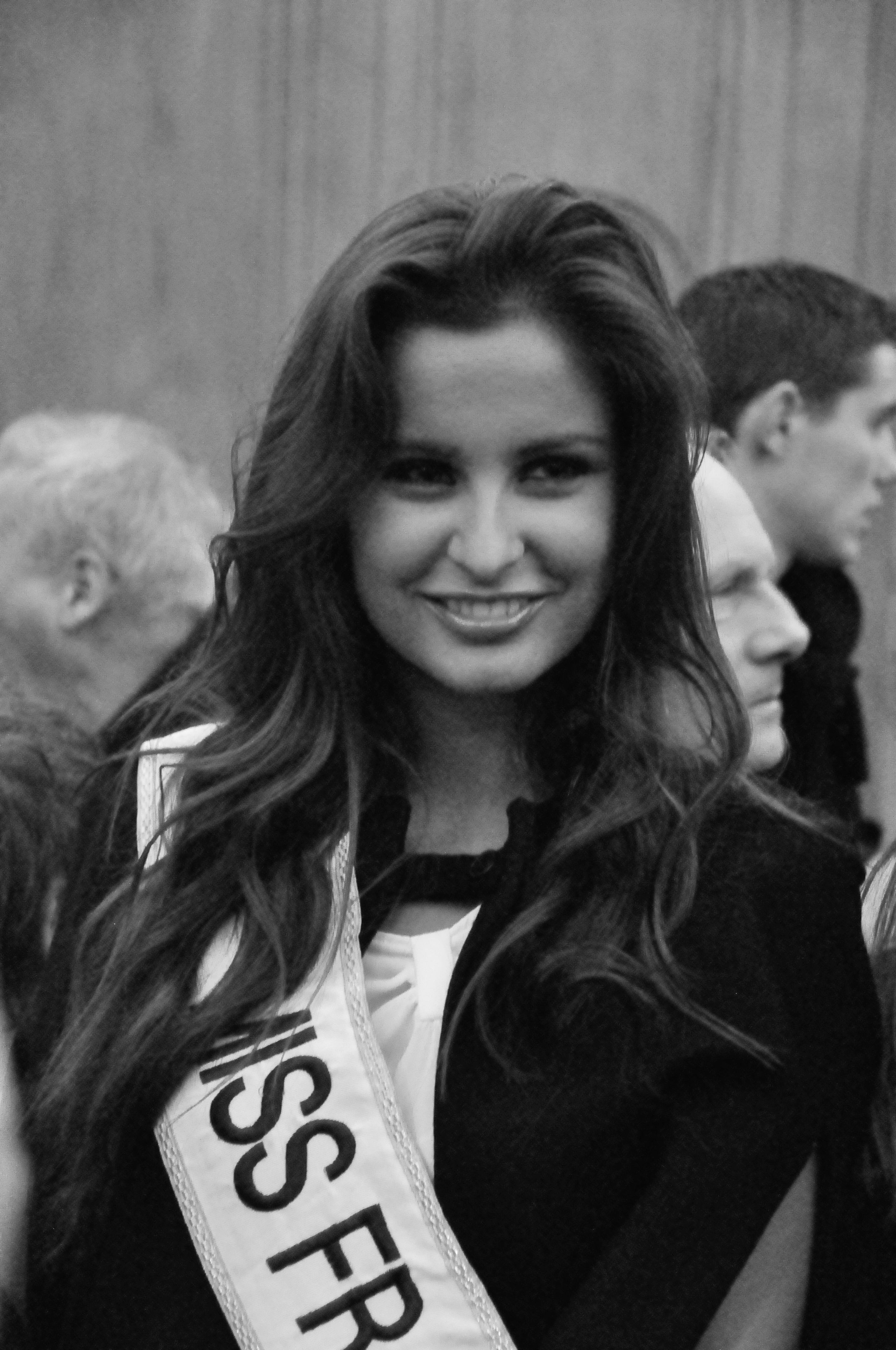 Malika Ménard à l'hôtel de ville de Caen le 19 novembre 2010